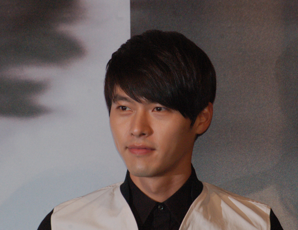 2011년 2월 14일 서울 왕십리 CGV에서 열린 영화 《사랑한다, 사랑하지 않는다》 언론시사회에 참석한 현빈.